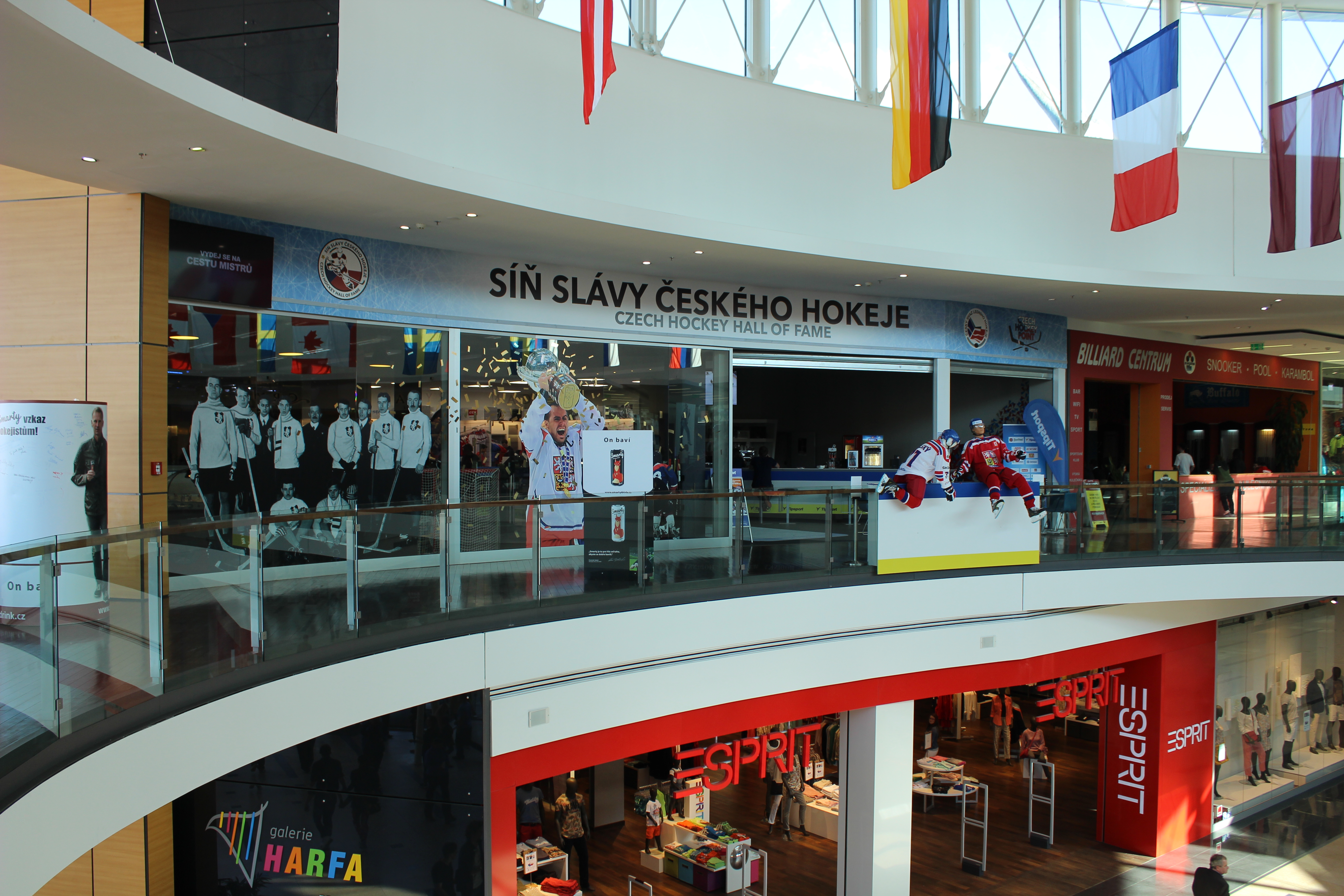 Vstup do Síně slávy českého hokeje v interiéru Galerie Harfa u O2 Areny během utkání Česká republika - Německo (4:2) na IIHF mistrovství světa v ledním hokeji 2015.